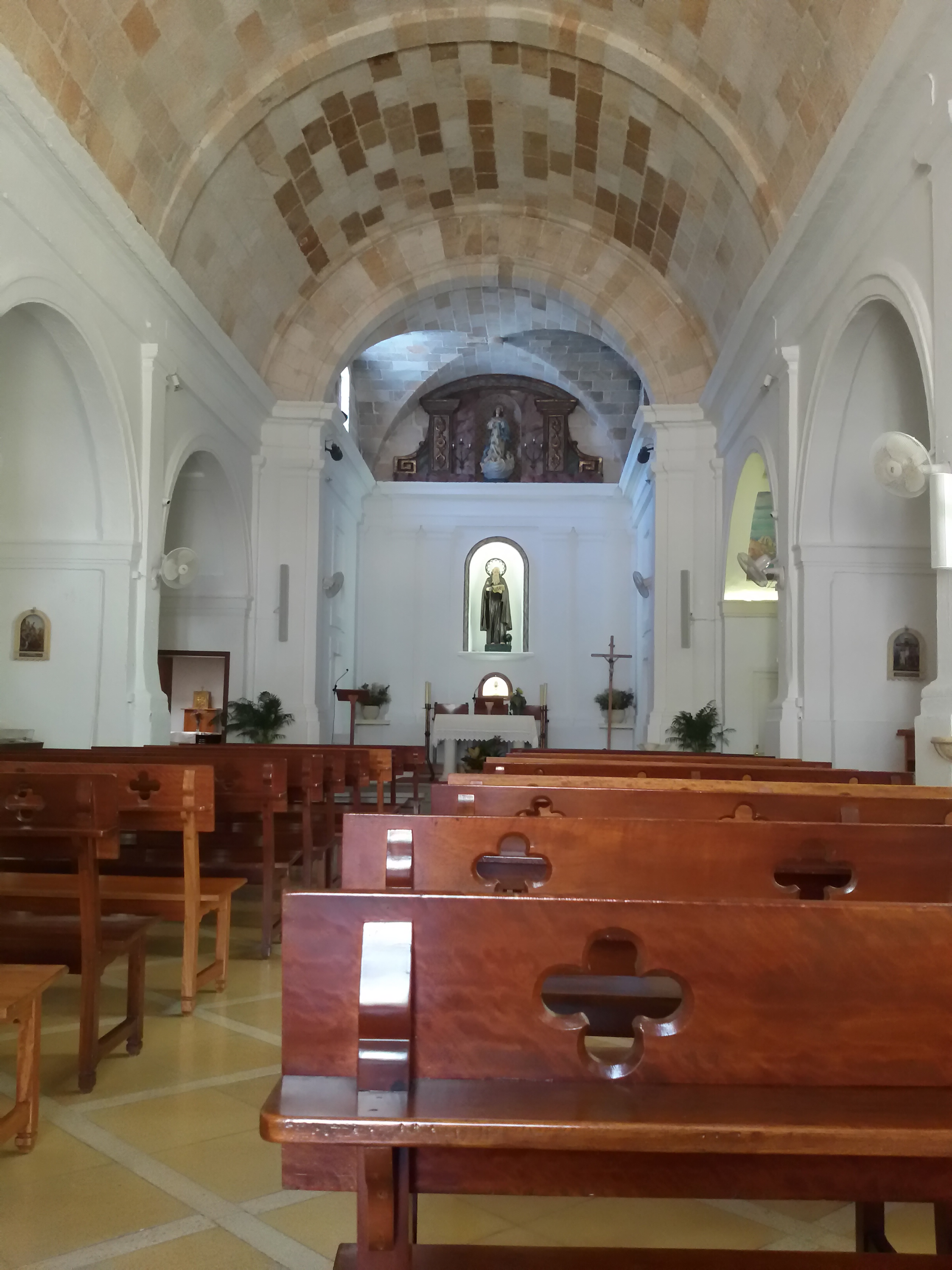 Interior de la Iglesia de San Antonio Abad de Fornells 20180626 135704